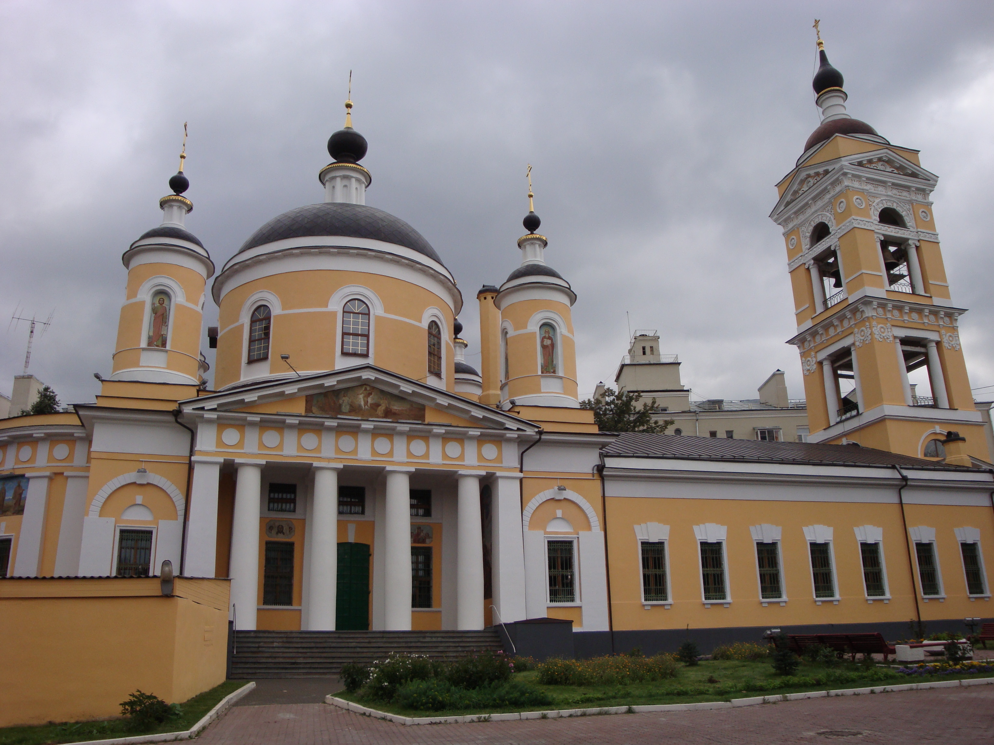 Троицкий собор в Подольске